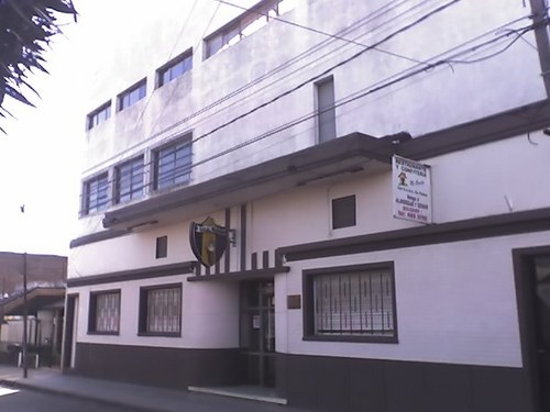 Sede del club CASA de Padua, Merlo Provincia de Buenos Aires.